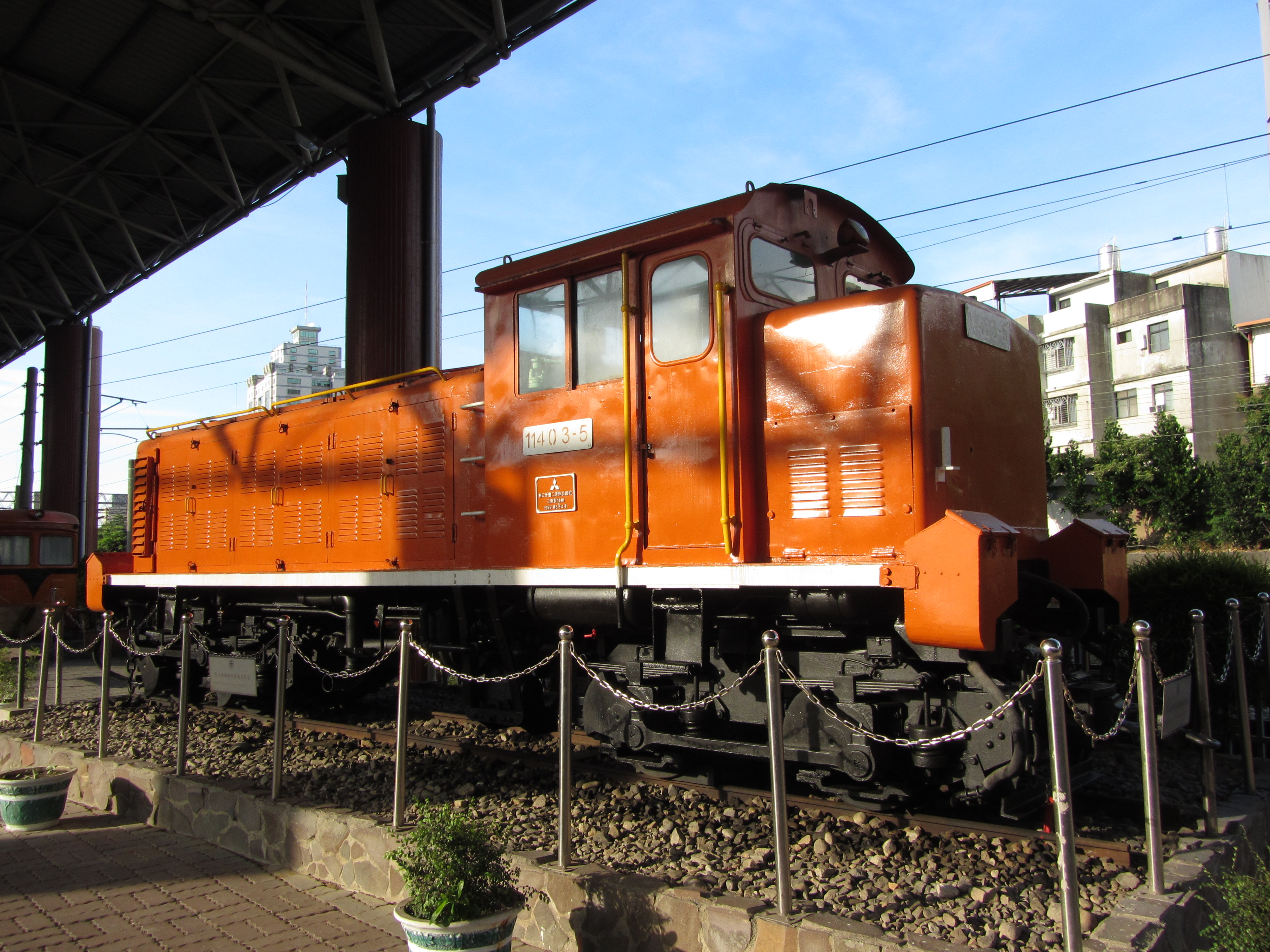 中文（台灣）: 阿里山森林鐵路11403-5柴油機車。